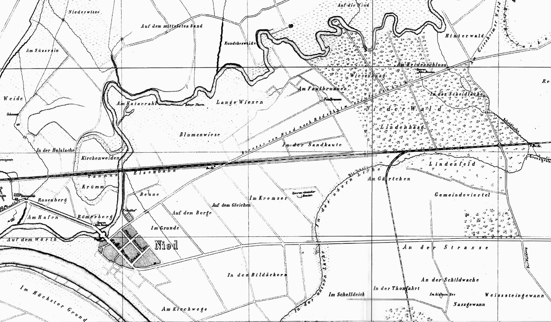 Nied bei Frankfurt am Main: Lageplan der Gemarkung der Gemeinde, 1870 (Ausschnitt)